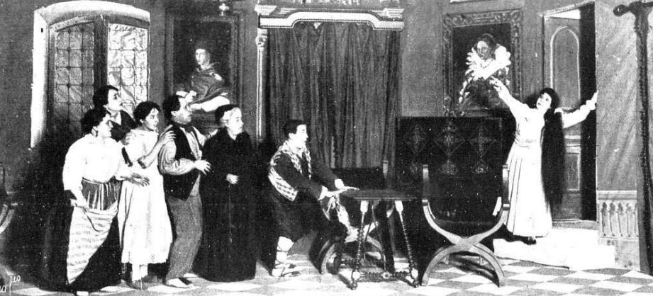 Escena del estreno de la obra de teatro La casa de Quirós, de Carlos Arniches.